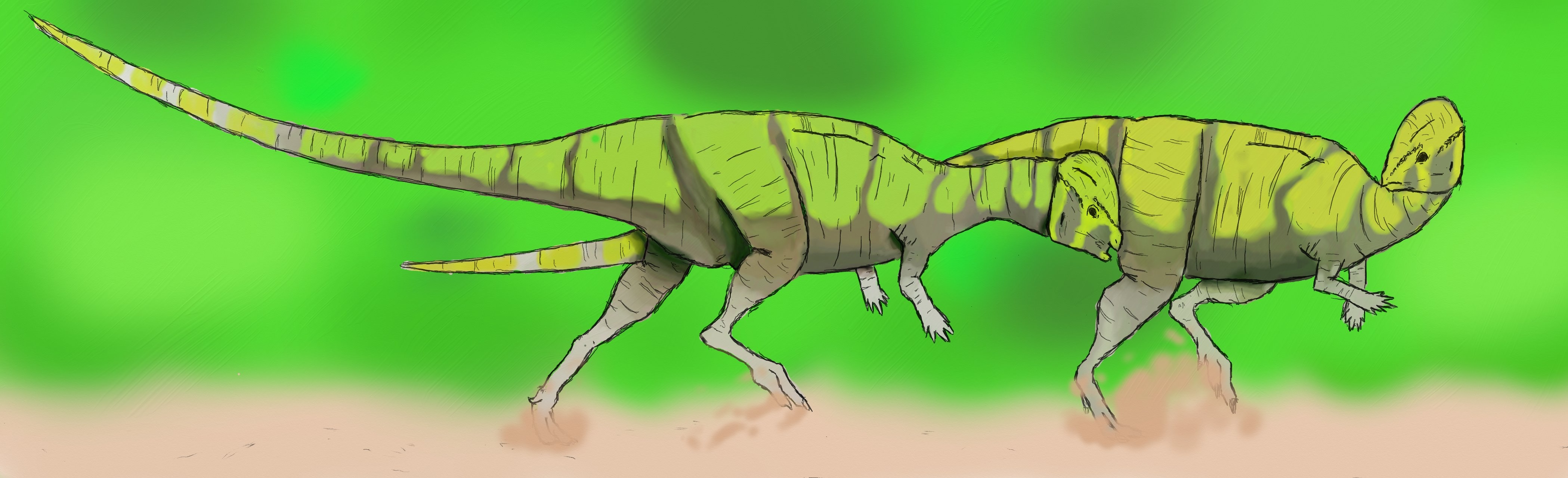 Cette scène représente le petit herbivore Prenocephale dans son habitat de Mongolie à la findu Crétacé. Cette reconstitution se base sur la théorie selon laquelle les mâles adultes se servaient de leur épais dôme crânien pour se battre entre eux, principalement pour des questions de territoire ou d'accès aux femelles (peinture digitale)